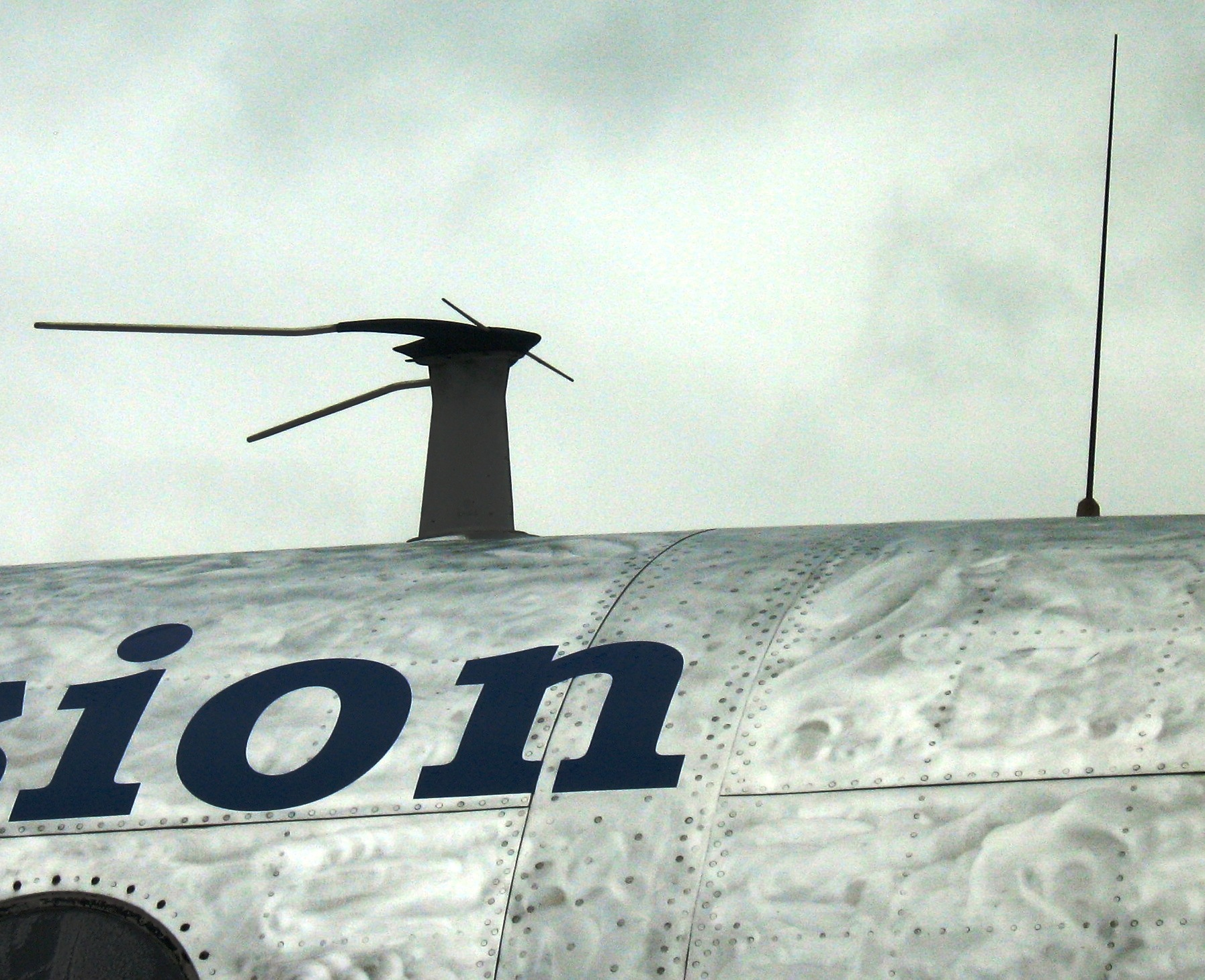 Antenne d'avion au Bourget au Salon international de l'aéronautique et de l'espace 2011